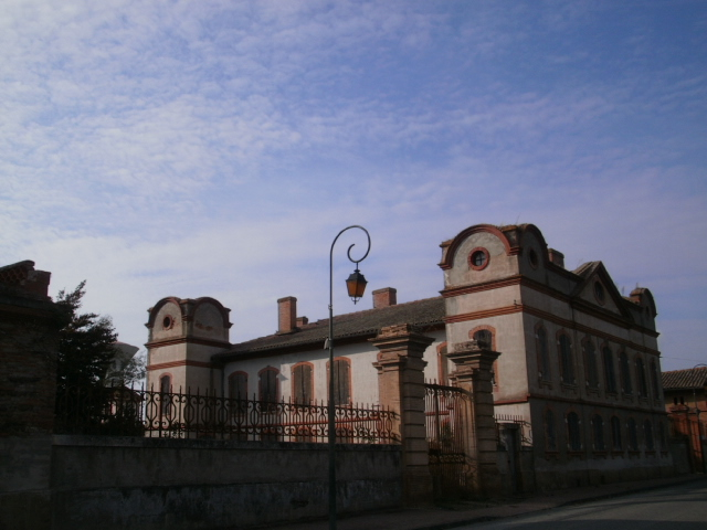 Château de Saint-Clar-de-Rivière .